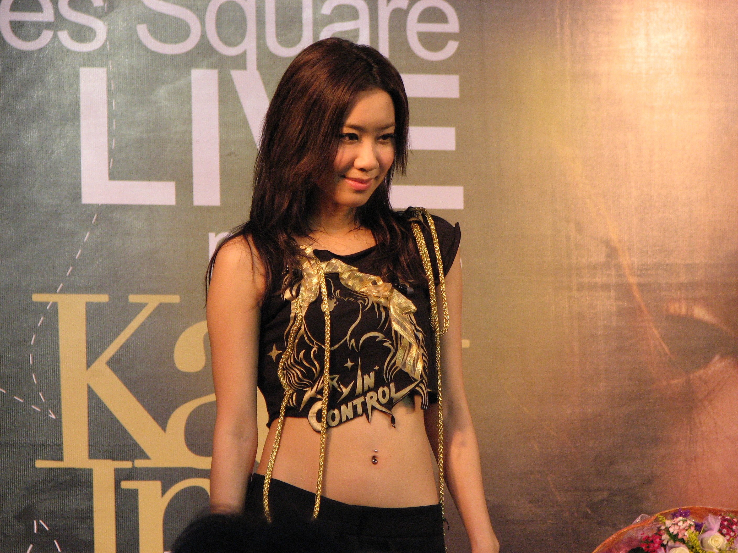 Kary Ng